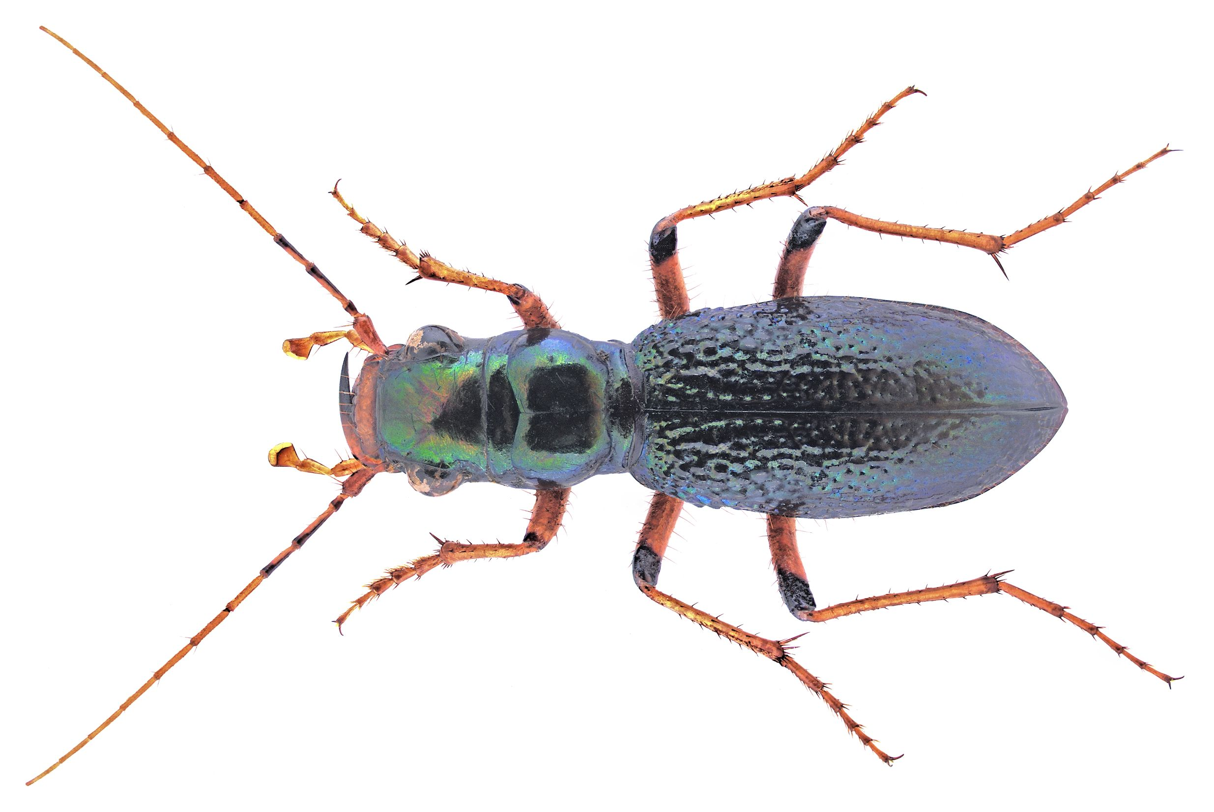 Familie: Carabidae Groesse: 22 mm Fundort: Ostafrika, Kenia, Taita Hills leg. U.Schmidt, 1991; det. J.Gebert Photo: U.Schmidt, 2007